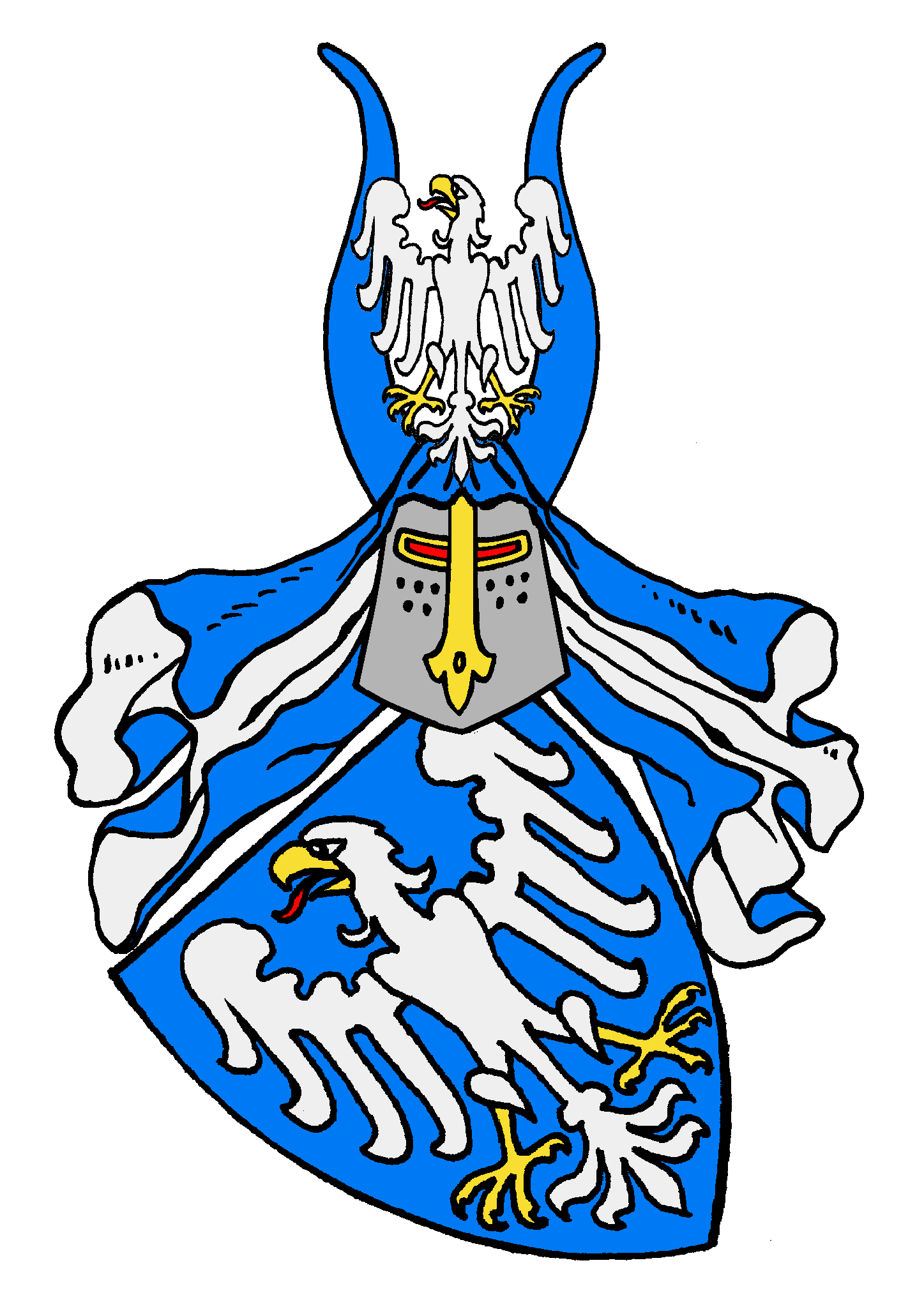 Stammwappen der von Armansperg (auch Armansberg oder Arnsberg), eines bayerischen Uradelsgeschlechts. Der namensgebende und älteste Stammsitz der Familie war die Hofmark Armannsberg bei Landshut in Niederbayern. Erstmals urkundlich erwähnt wurde das Geschlecht im Jahre 1221 mit Wernhardus und Wernherus frateres de Armansberge. Mit dem ebenfalls ab dem 13. Jahrhundert erscheinenden Ritter Sybotto Armansperger, Truchsess der bayerischen Grafen von Kirchberg, beginnt die Stammreihe. Die jüngere Linie blüht bis heute.